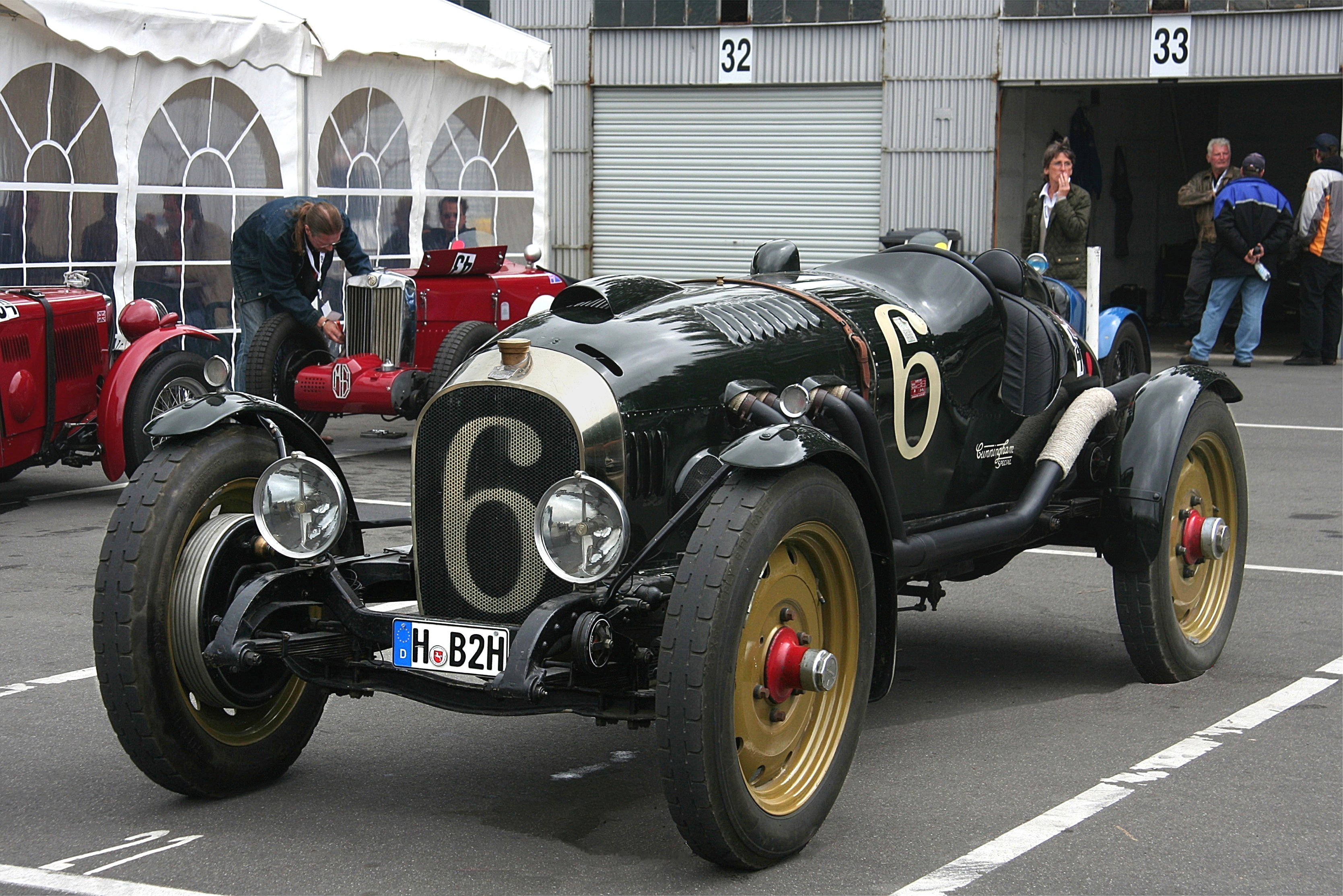 Cunningham Special, Baujahr 1924, beim Oldtimer Festival des DAMC im historischen Fahrerlager des Nürburgrings